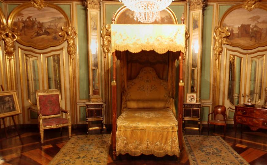 Quarto do rei no Palácio de Queluz